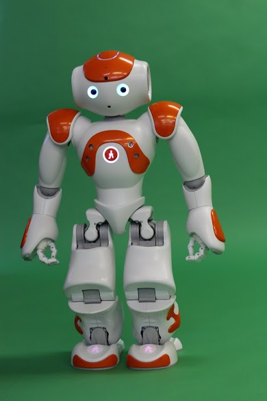 Een nao robot van dichtbij.